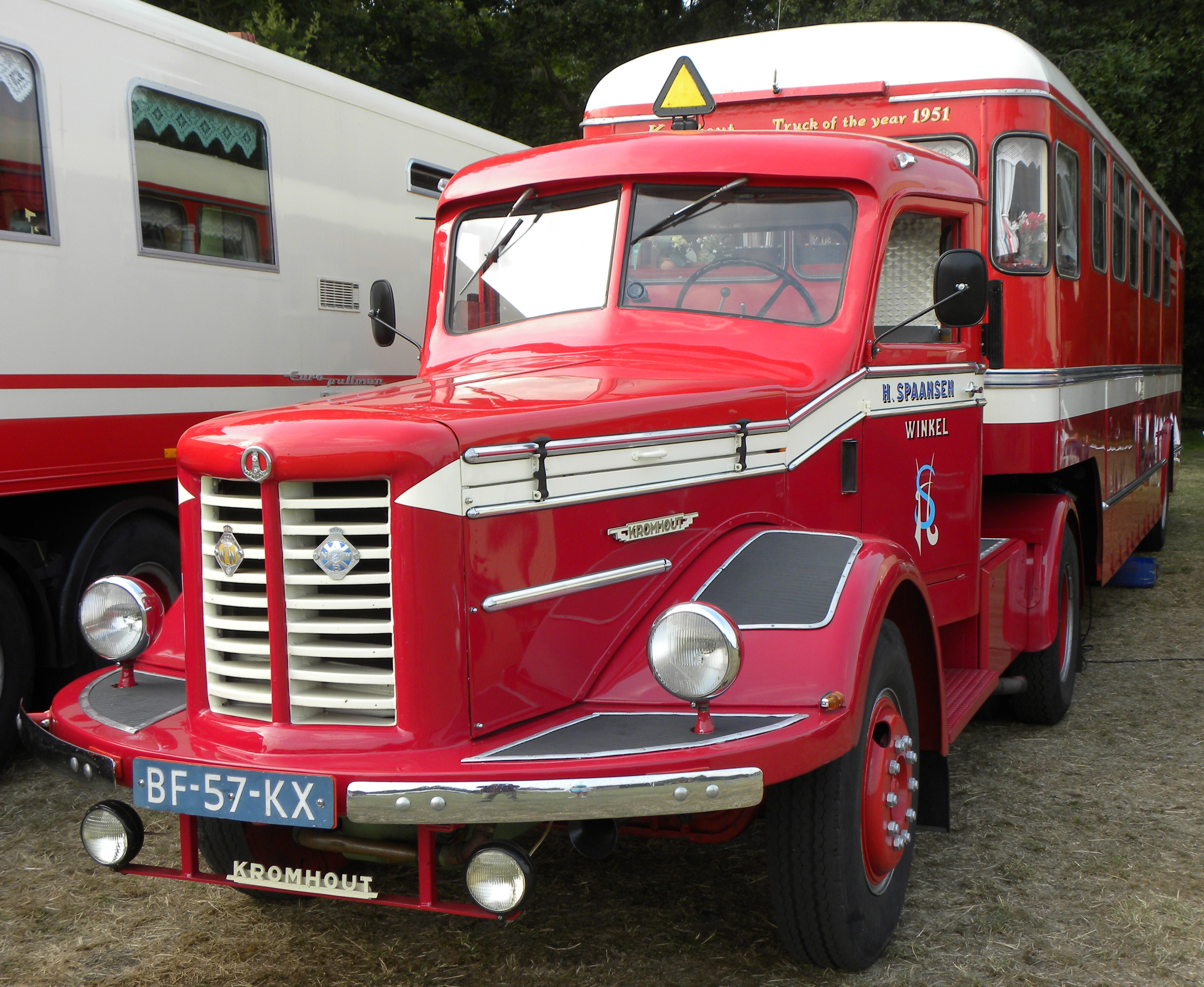 Kromhout V 6 T